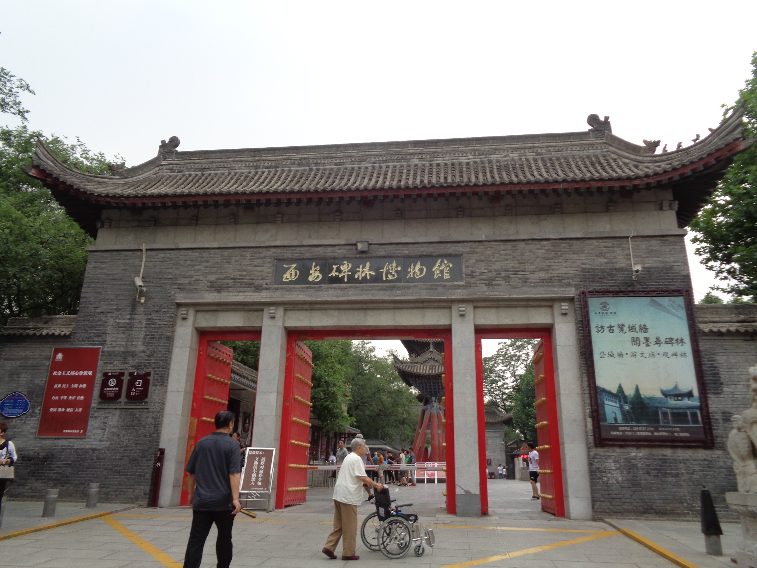 西安市碑林区碑林大门